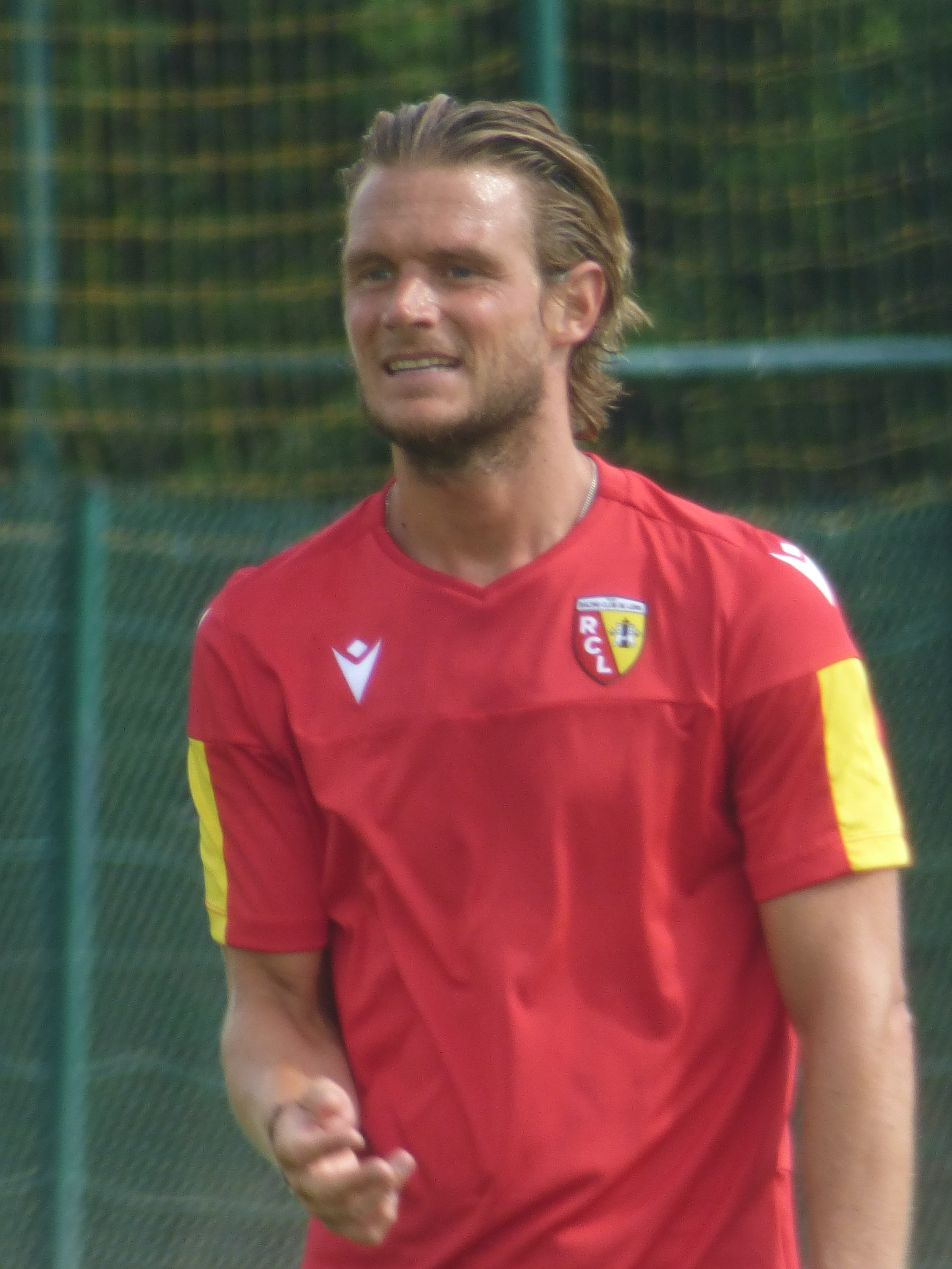 Guillaume Gillet lors de l'entraînement public du Racing Club de Lens, au centre technique et sportif de La Gaillette le 2 juillet 2019